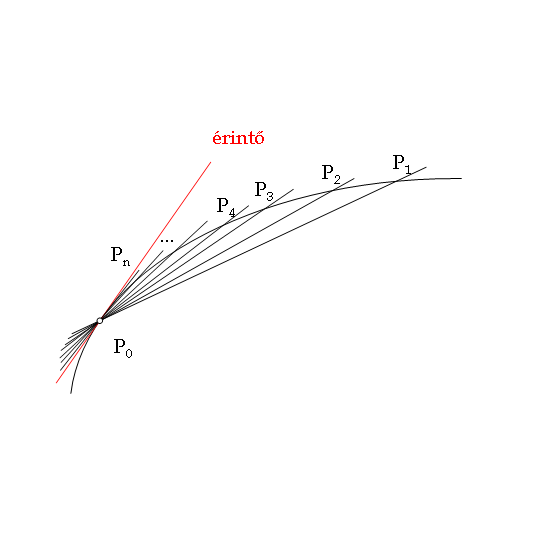 Illusztráció a differenciálhatóság cikkhez